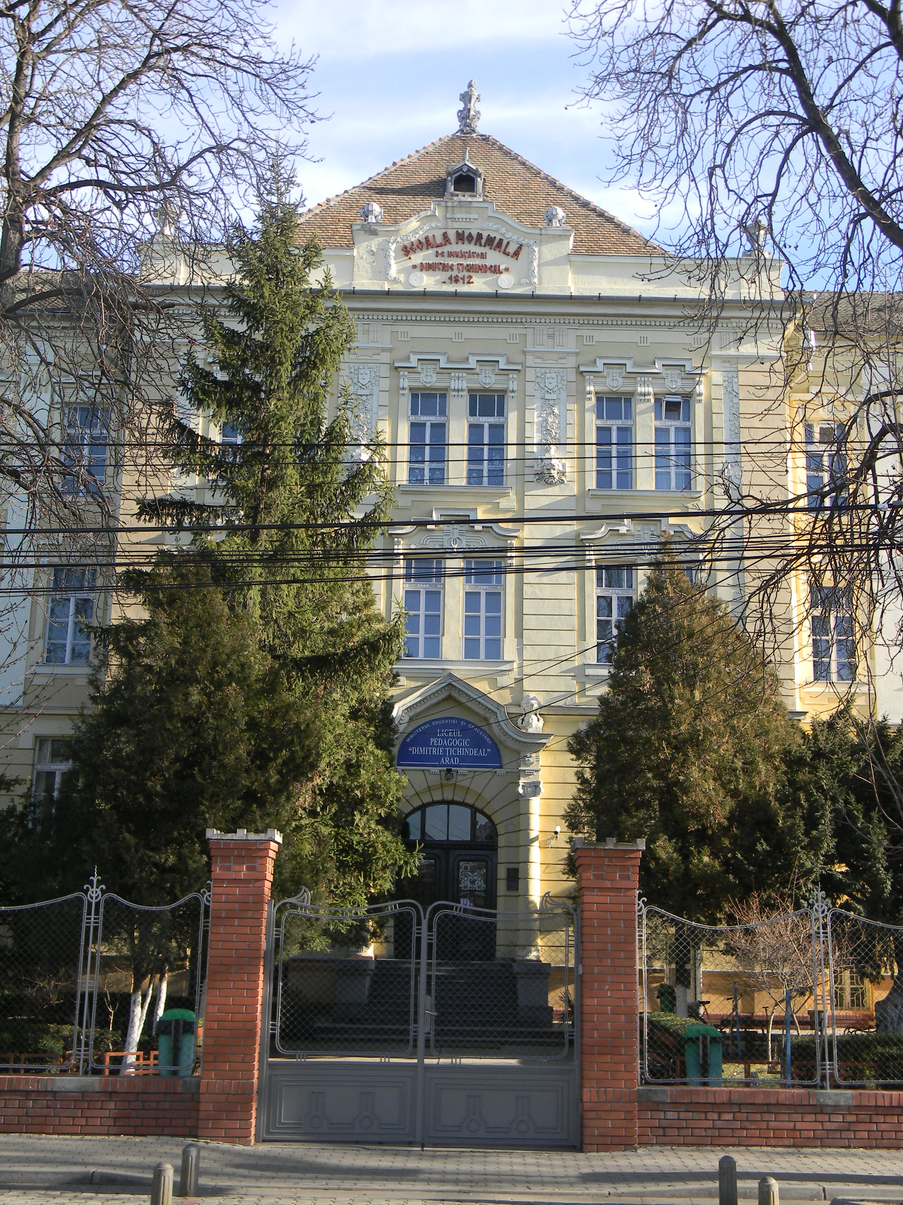 Liceul Pedagocic Dimitrie Tichindeal Arad